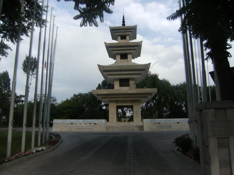 Korede Savaşan Türkler Anıtı